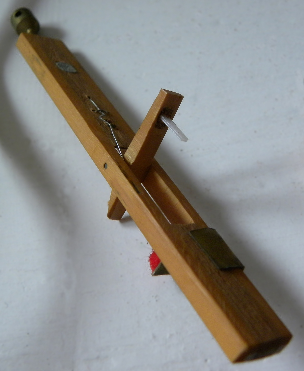 Skoczek klawesynu z piórkiem z tworzywa sztucznego